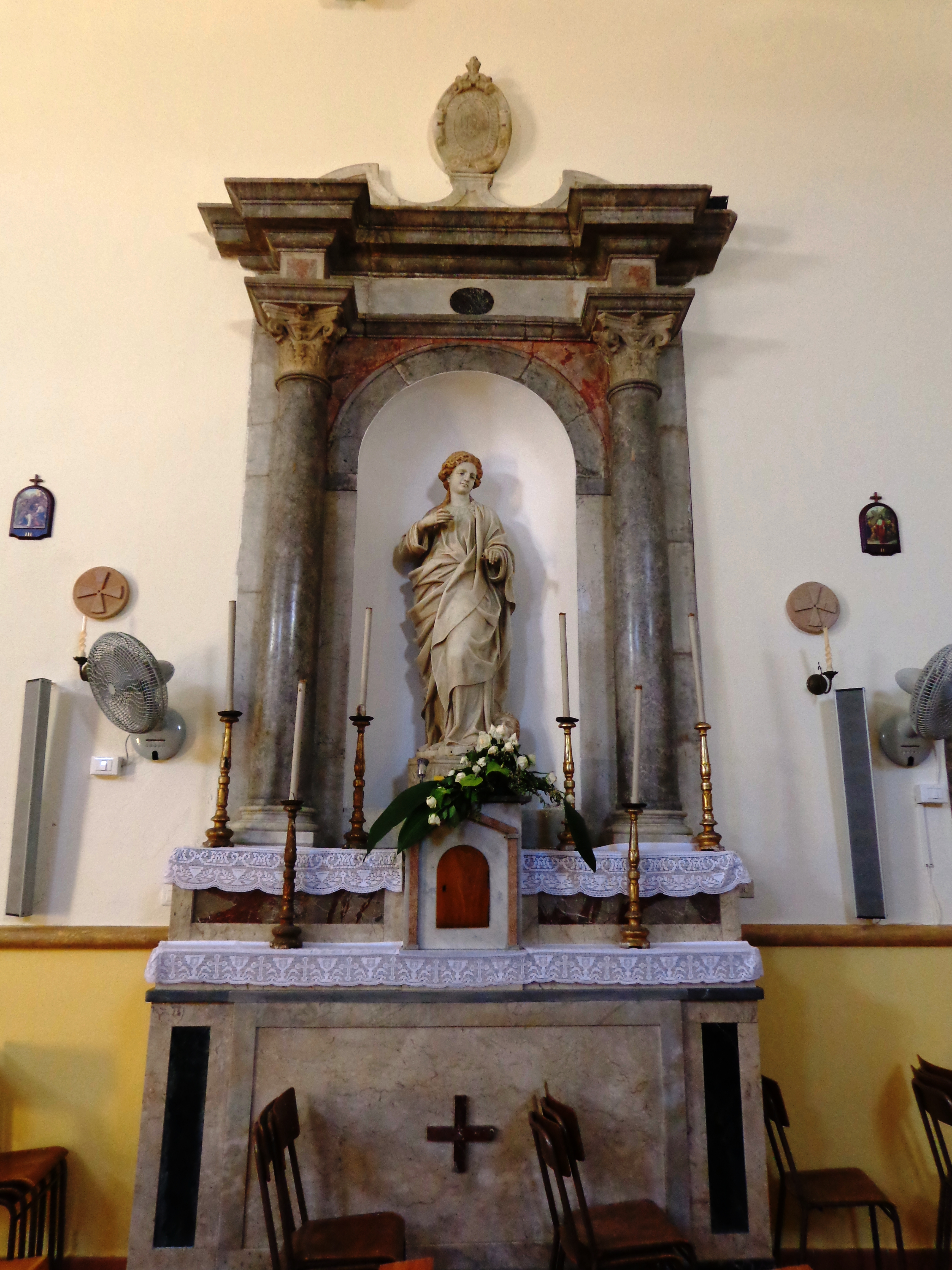 Barcellona P. di G. Gagini 03